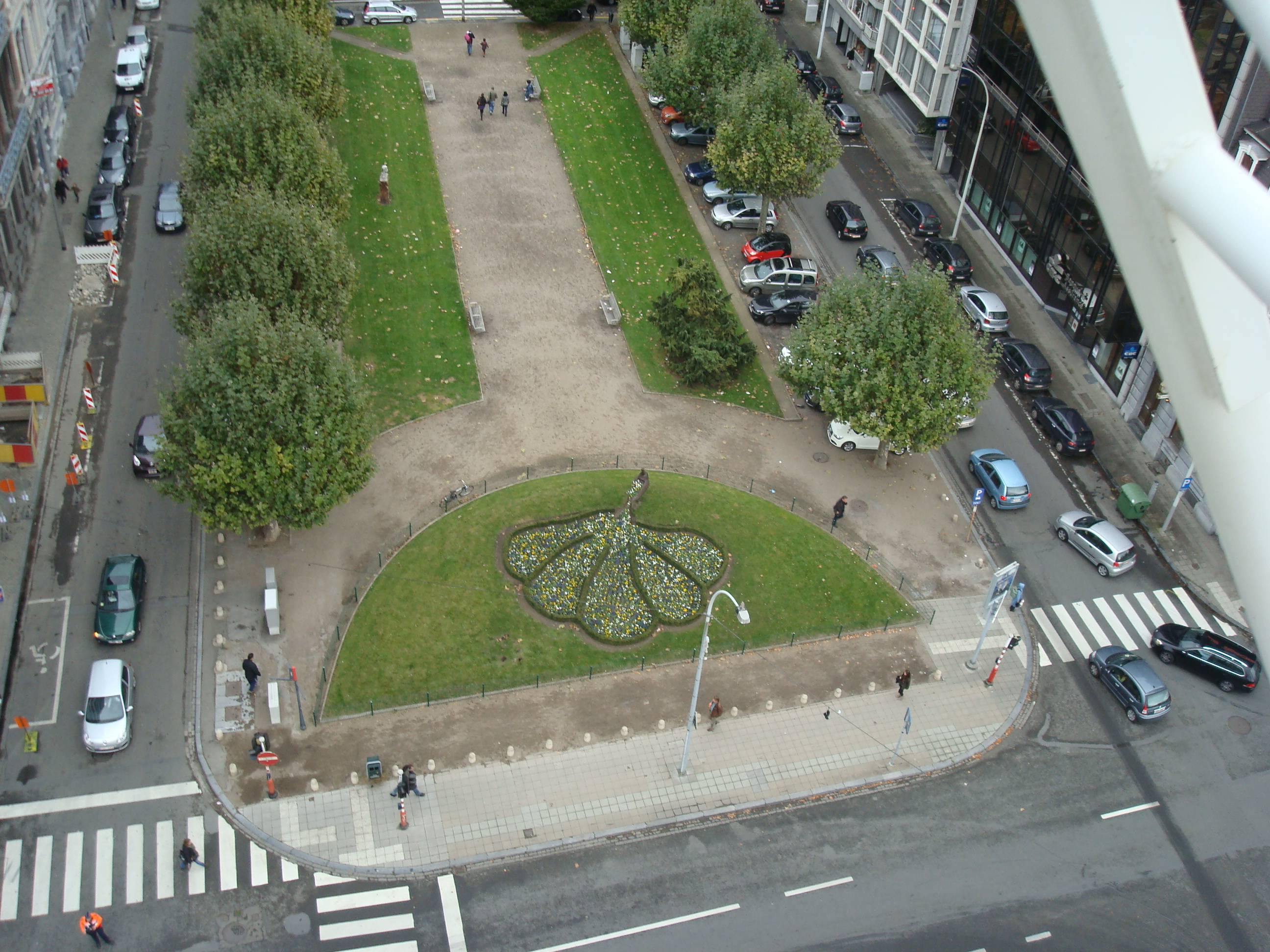 Liège, entrée du Boulevard Piercot vue du haut de la grande roue sur le boulevard d'Avroy